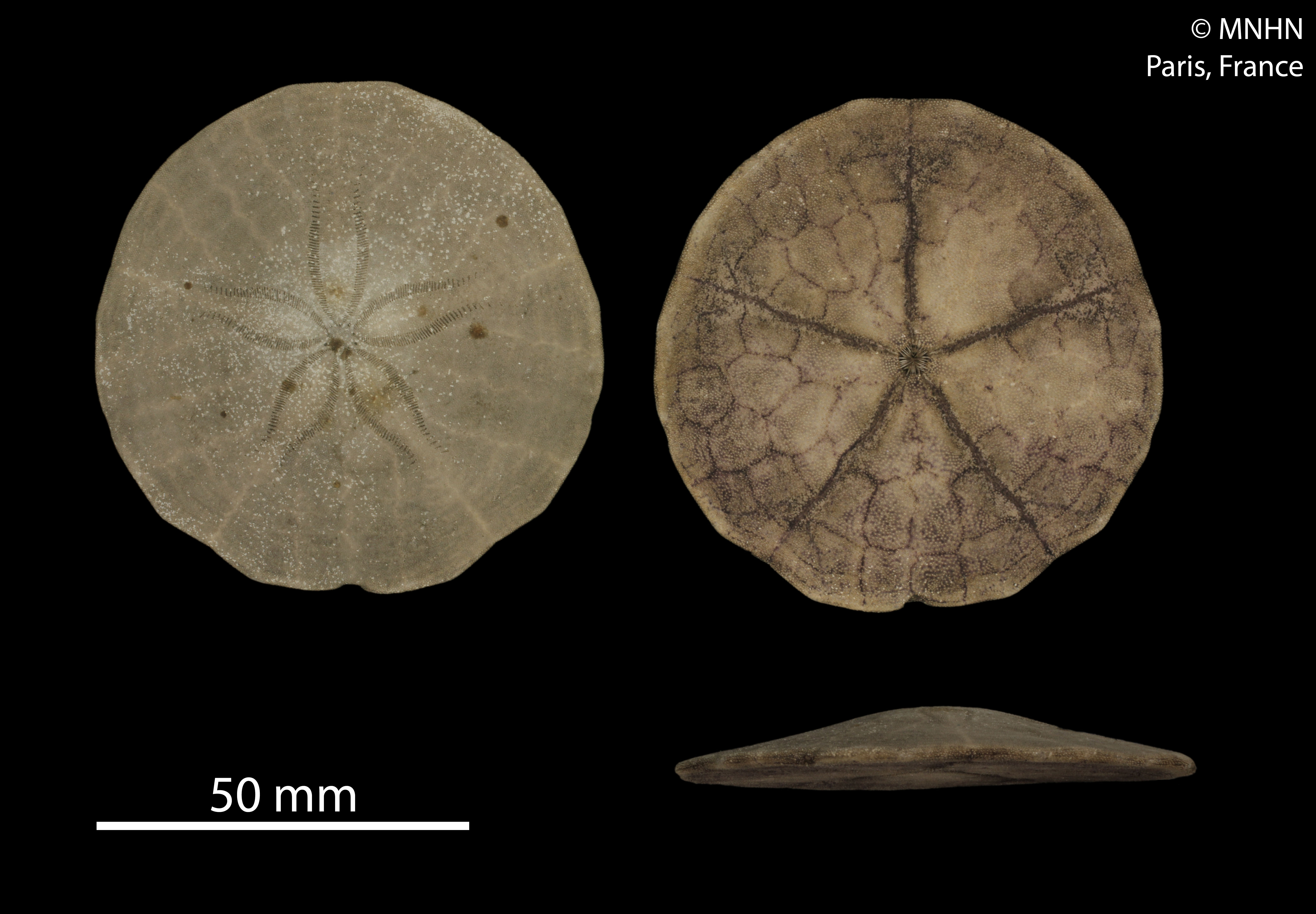 Echinarachnius parma, collection du Muséum National d'Histoire Naturelle (Paris, France).